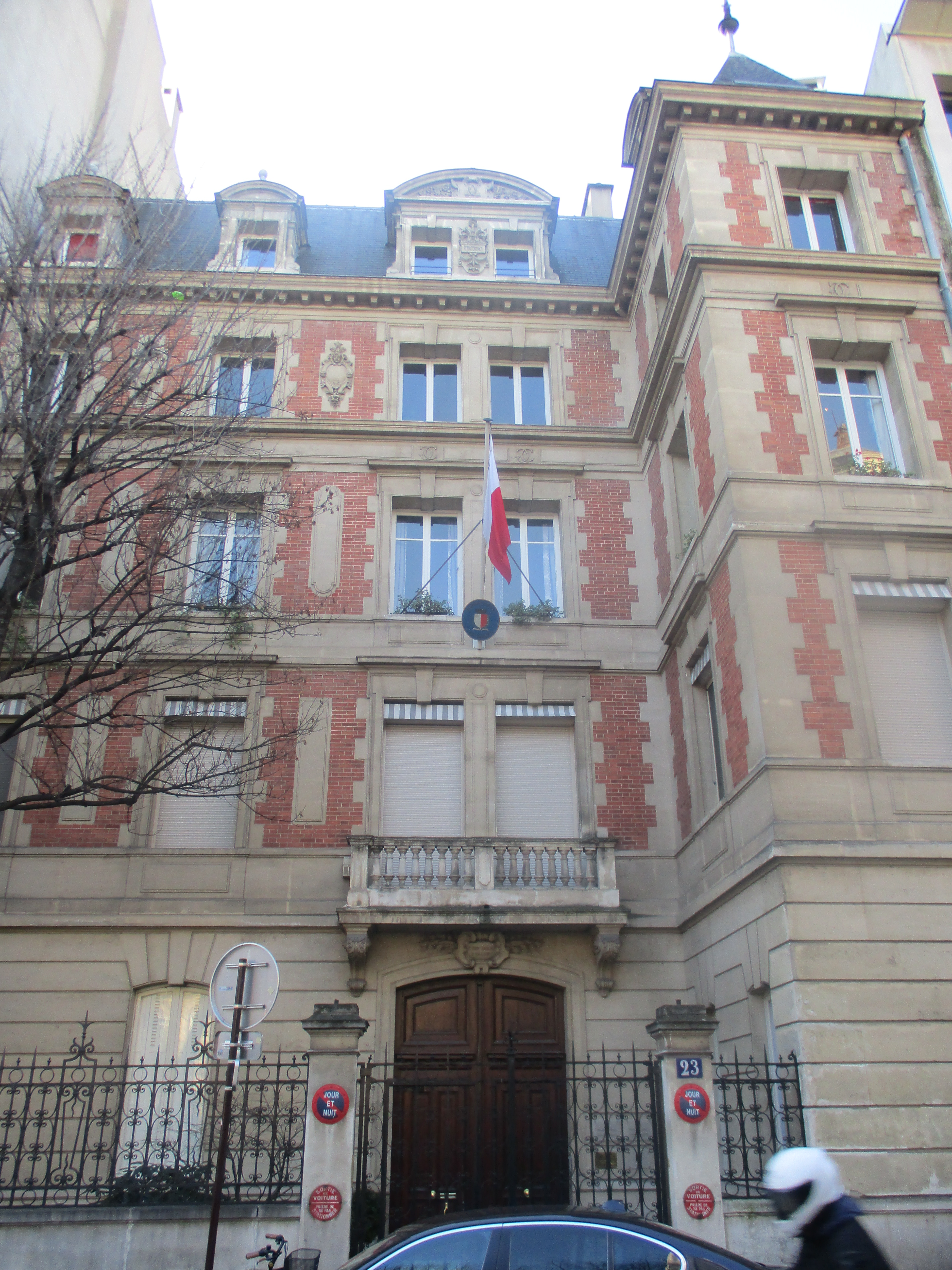 23 rue d'Artois, Paris VIIIe. Ambassade de Malte.